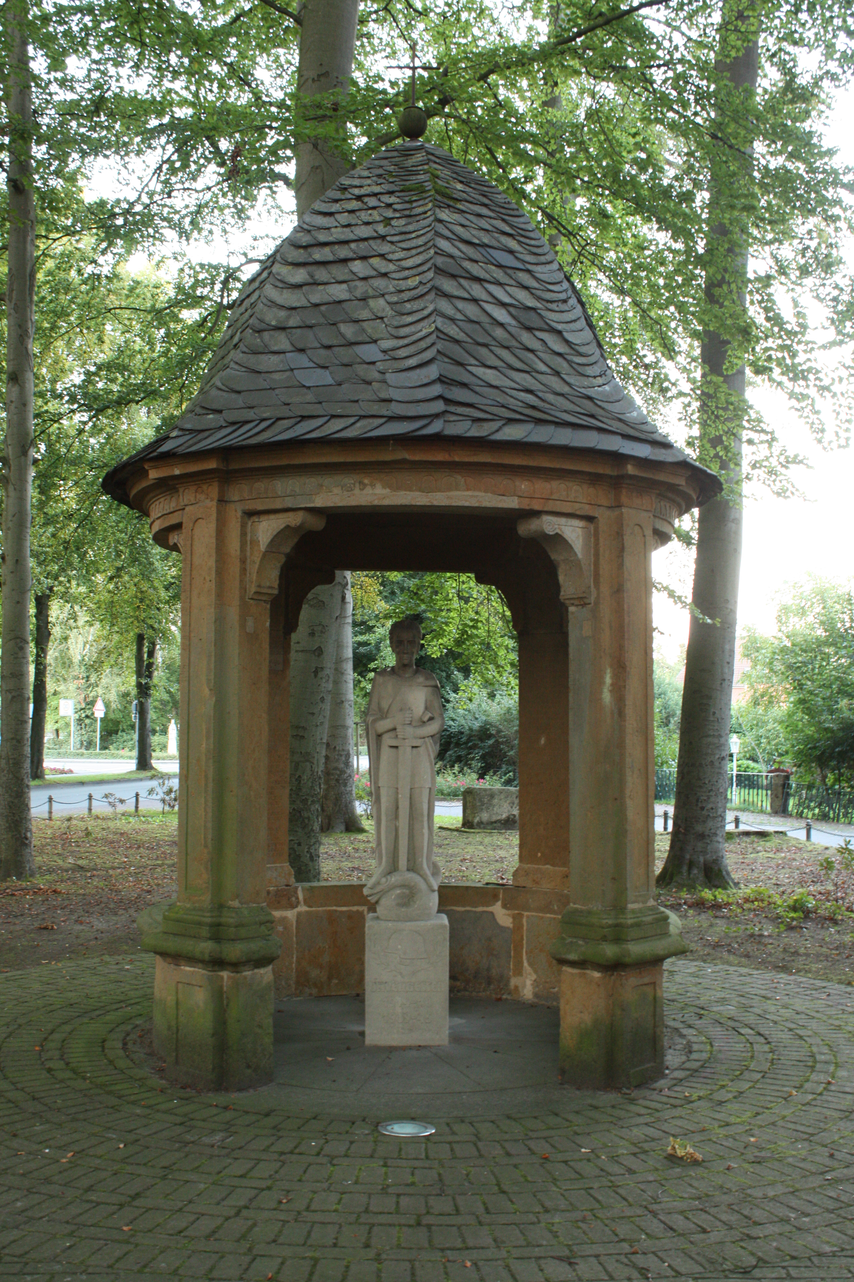 Brunnenhäuschen aus dem Innenhof des ehem. Zisterzienserklosters Marienfeld, 1. Hälfte des 18. Jahrhunderts, Heutige Nutzung: Ehrenmal, Nr. 28 der Denkmalliste von Harsewinkel